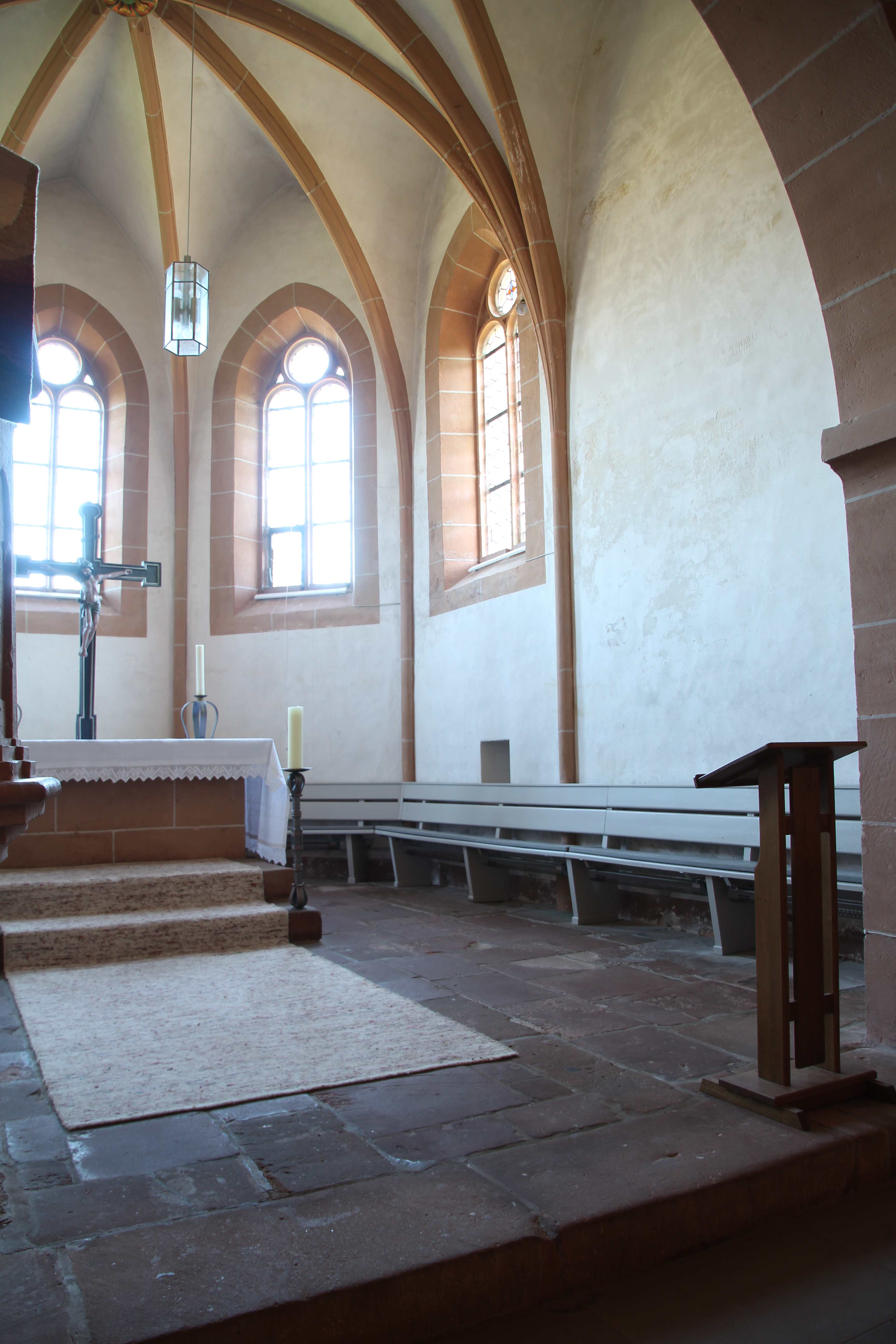 Christenberg